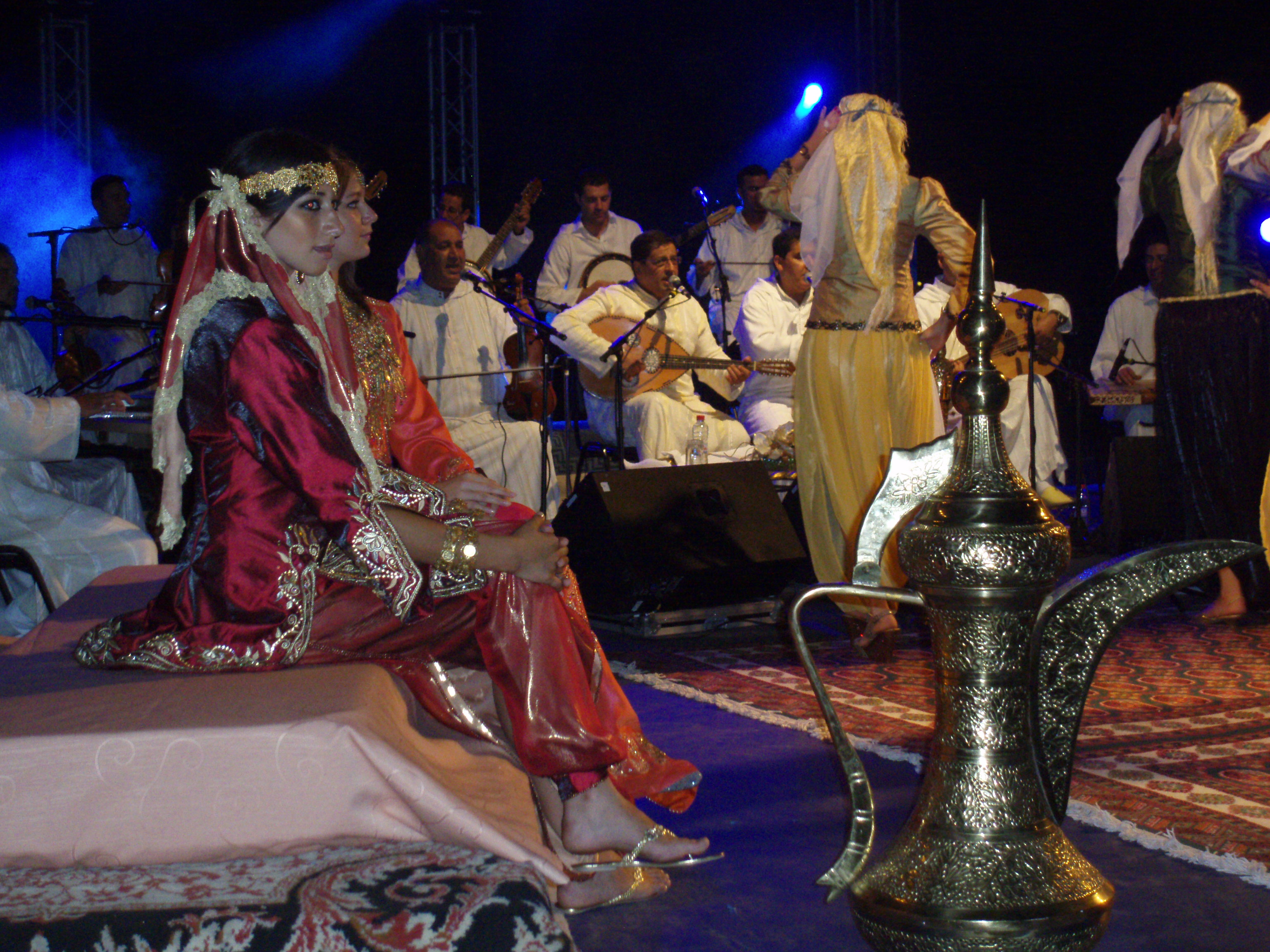 Orchestre de Nouri Koufi interprète de hawzzi